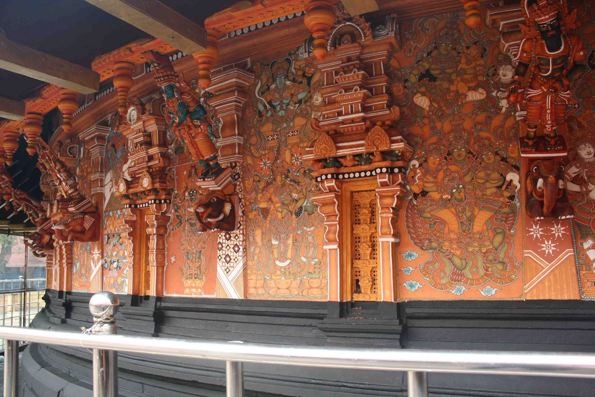 വൈക്കം മഹാദേവക്ഷേത്ര ശ്രീകോവിലിലെ ചുവർചിത്രങ്ങൾ